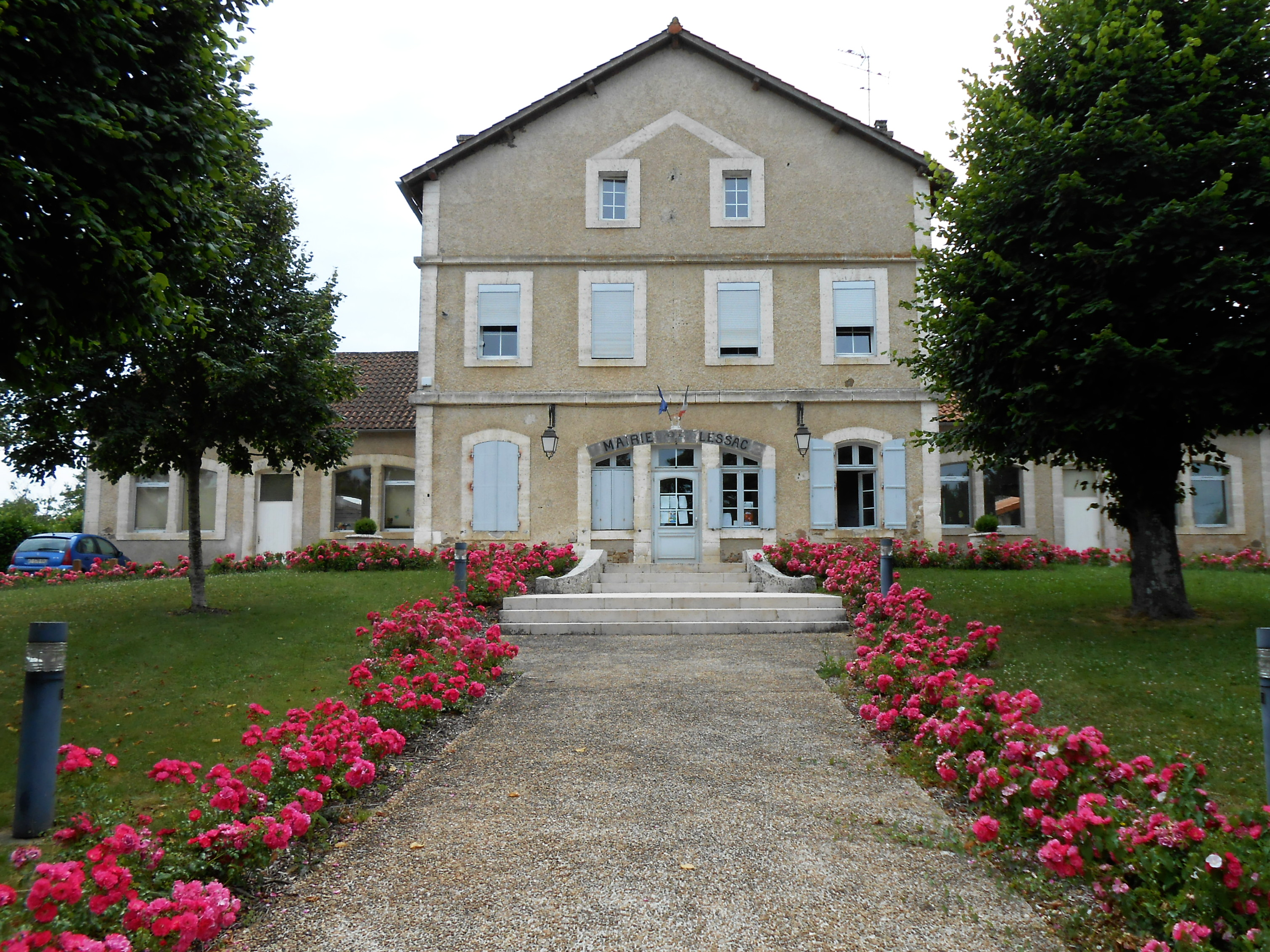 Lessac, Charente, France